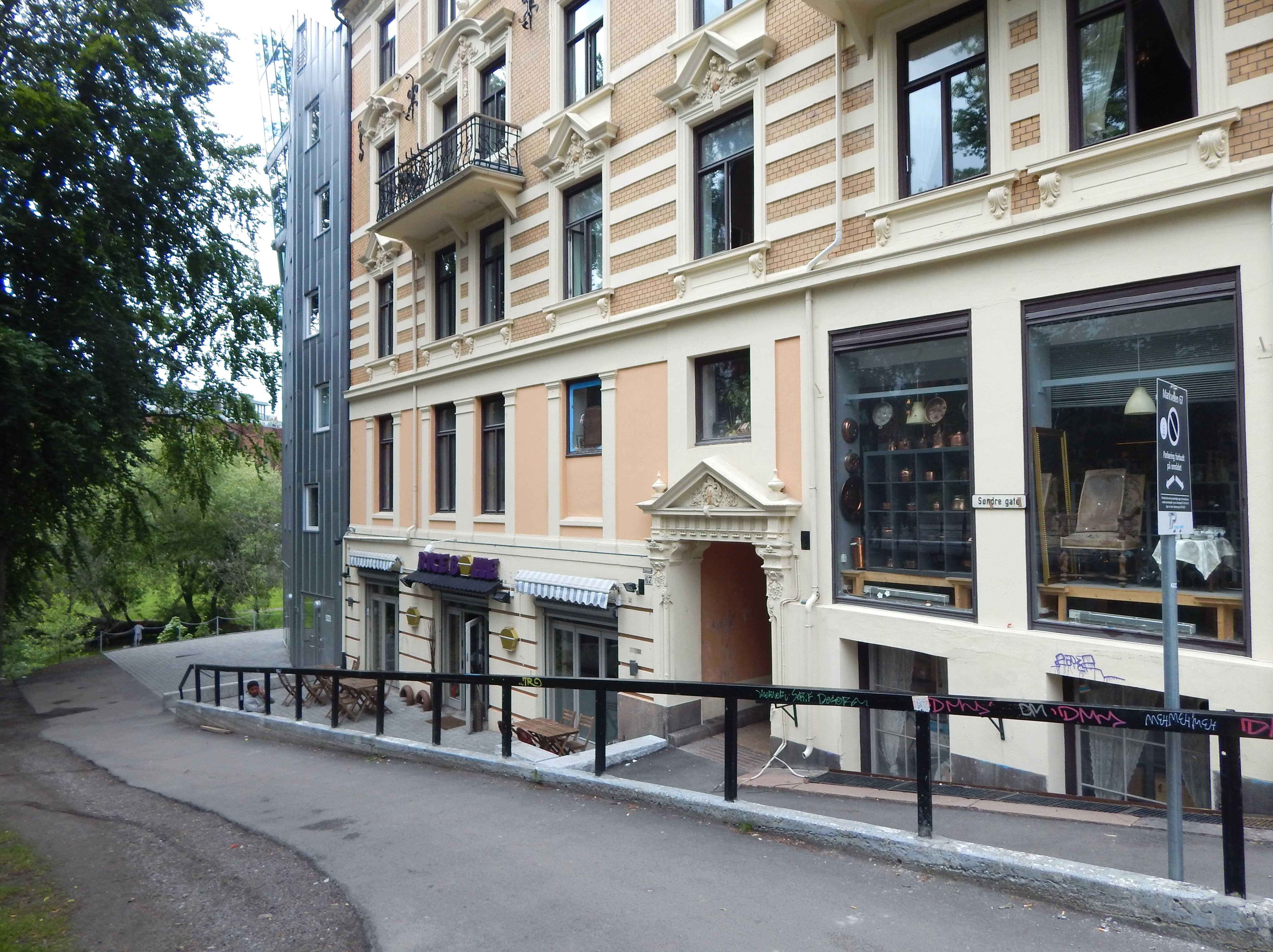 Søndre gate